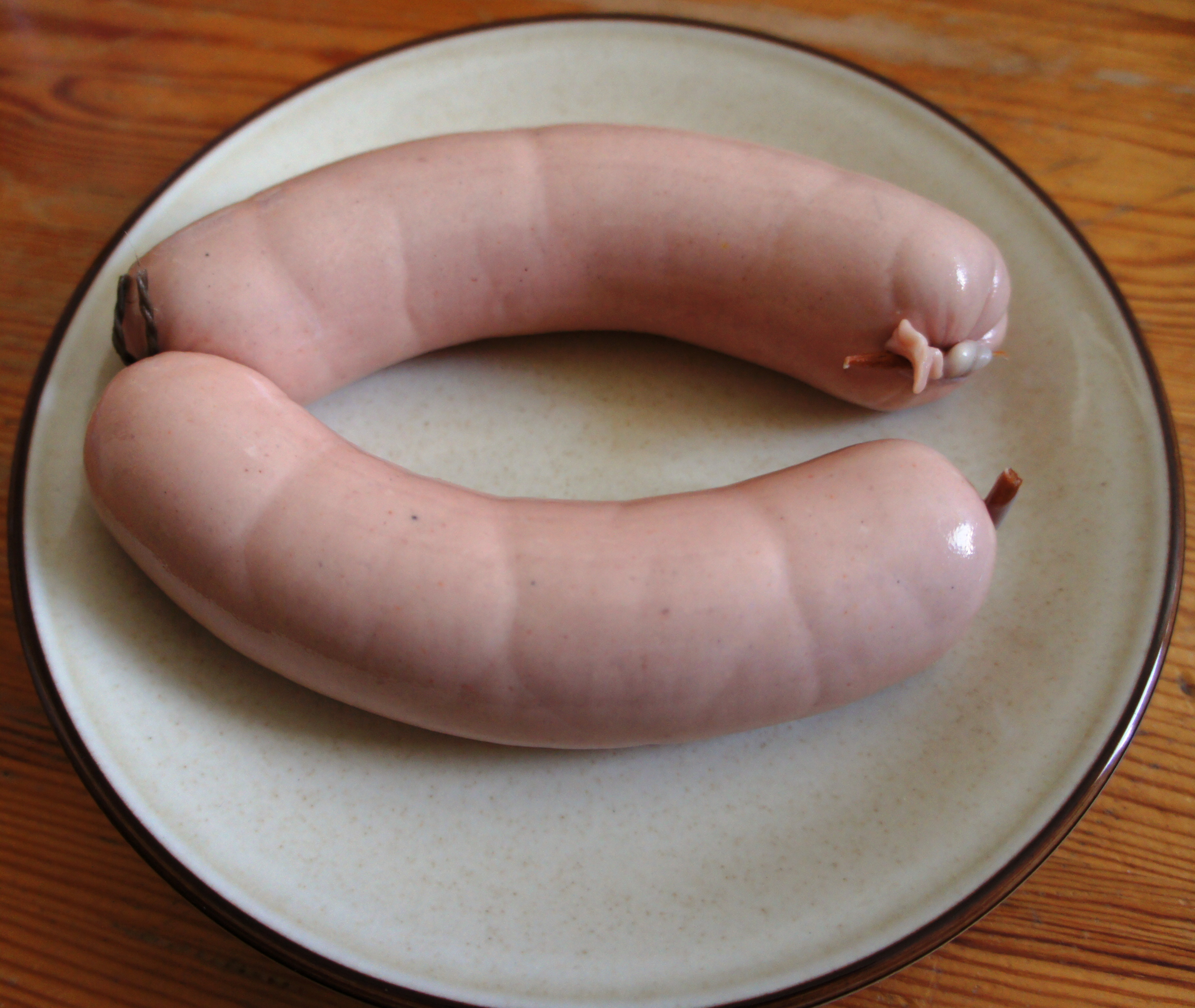 Ein paar Appenzeller Siedwürste (roh), das eine Ende mit einer Schnur abgebunden, die anderen Enden mit dem traditionellen Holzspiess im Darmknopf.